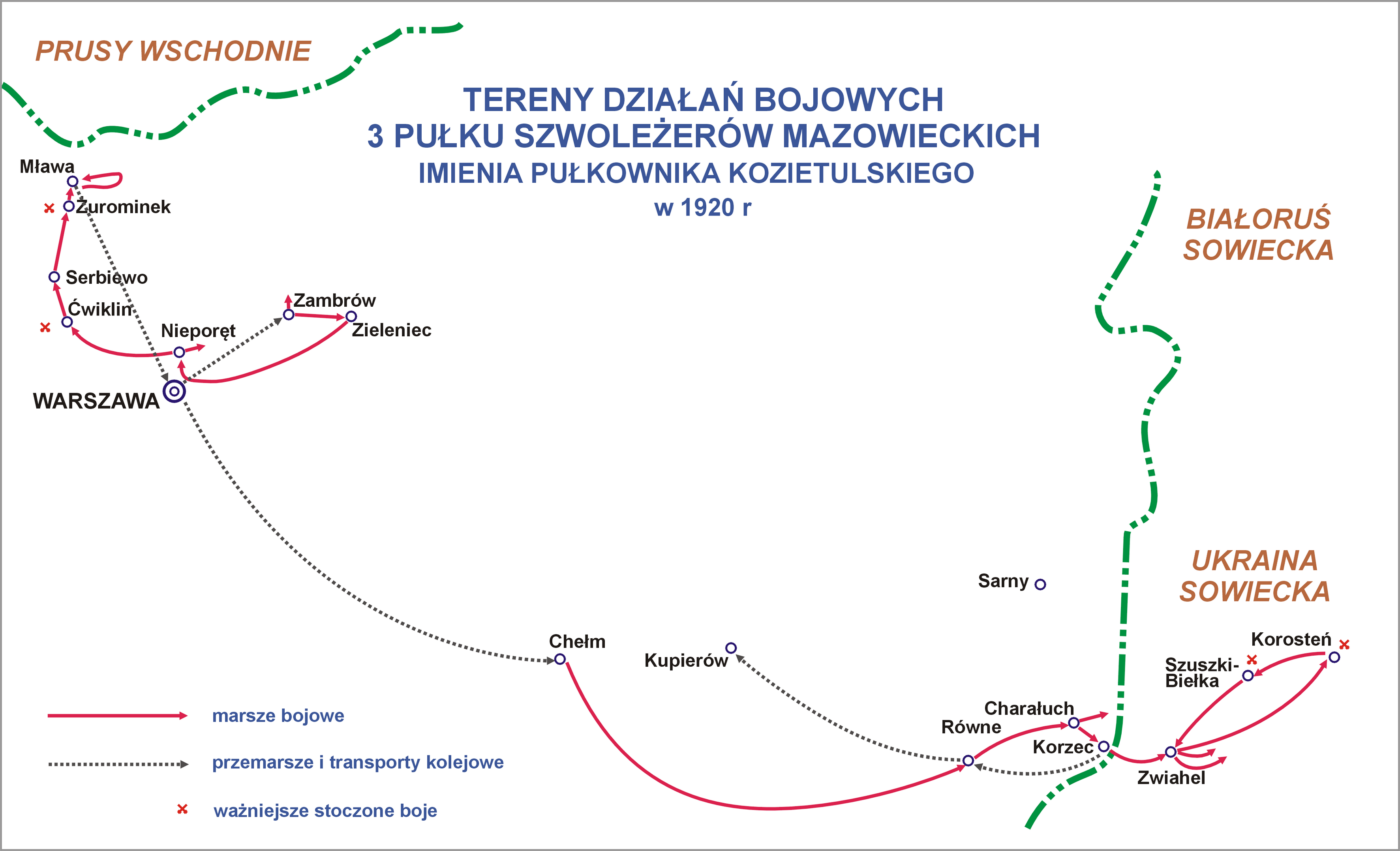 Tereny działania 3 Pułku Szwoleżerów Mazowieckich im. płk Kozietulskiego